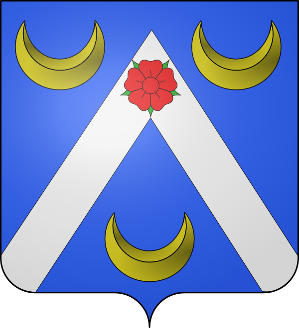 D'azur au chevron d'argent, chargé sur la pointe d'une rose de gueules, barbée de sinople, et accompagné de trois croissants d'or.